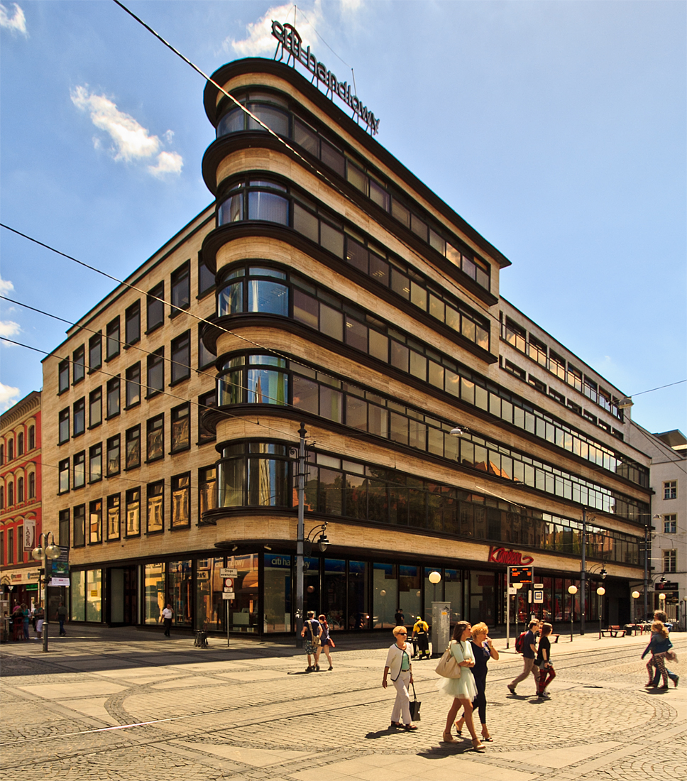 Dawny dom handlowy Kameleon, wcześniej Petersdorff